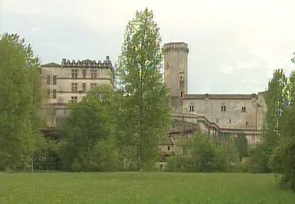 Vue d'ensemble du Château de Bourdeilles, avec le palais Renaissance à gauche, et le donjon médiéval à droite.